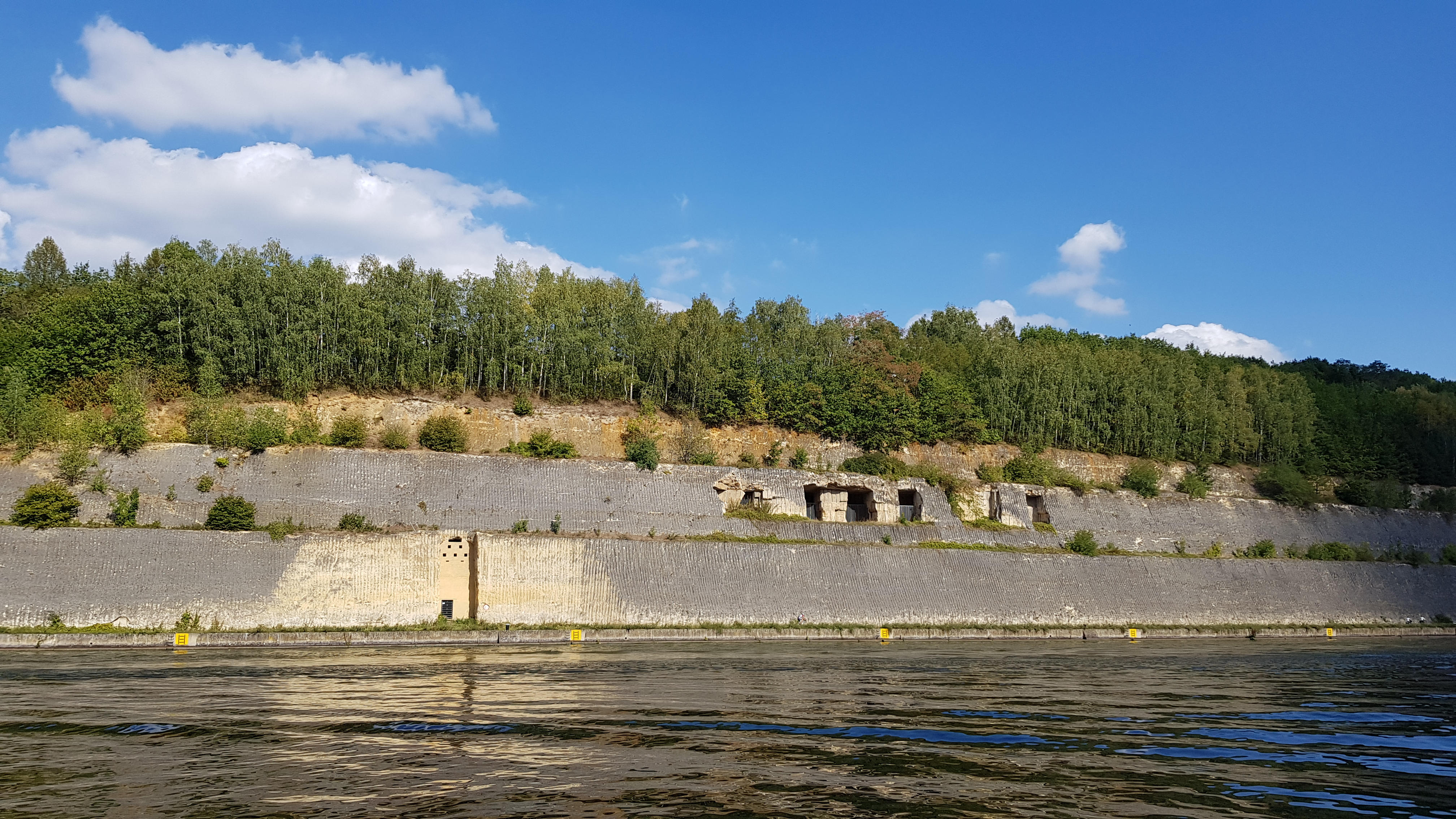 Groeve De Keel, Kanne, België